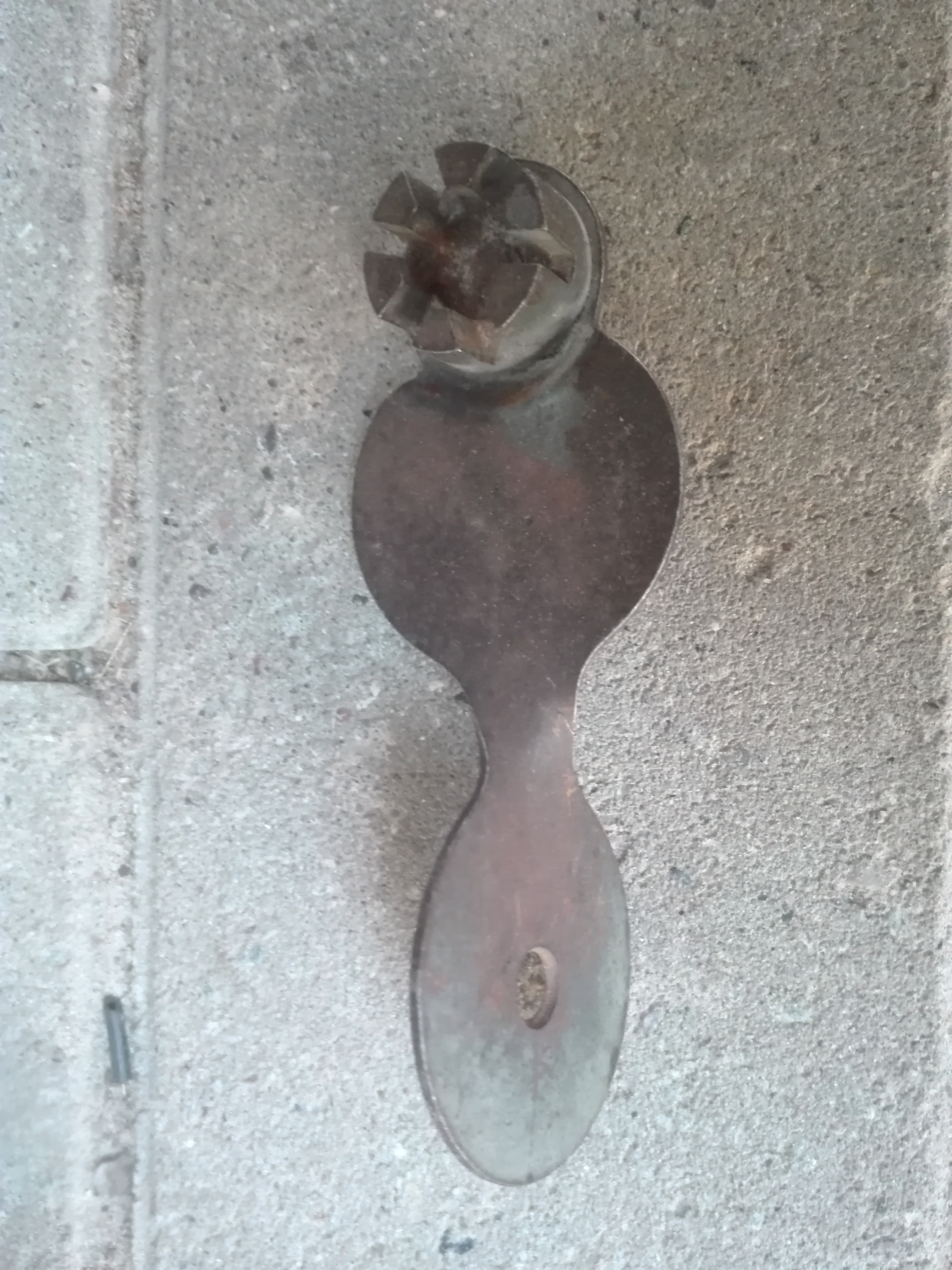 Ein Nippelspanner älterer Bauart